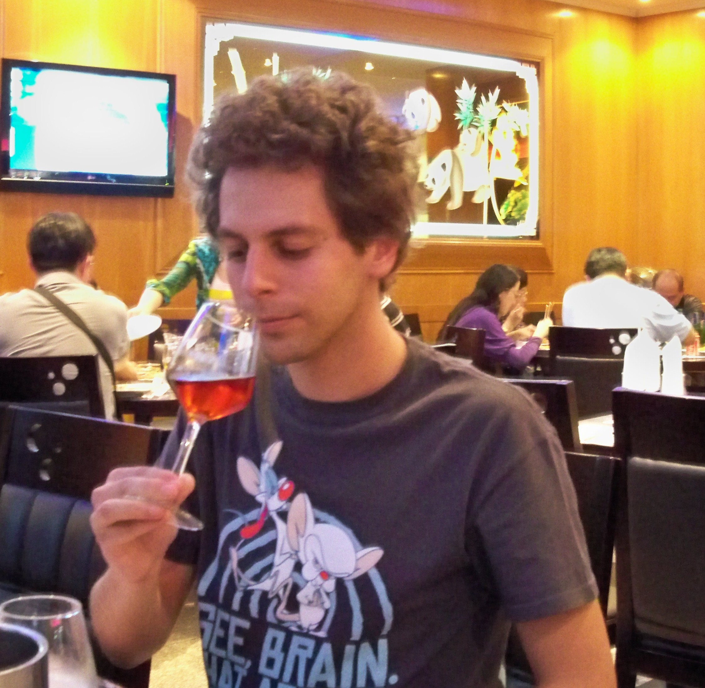 dégustation de vin - humer